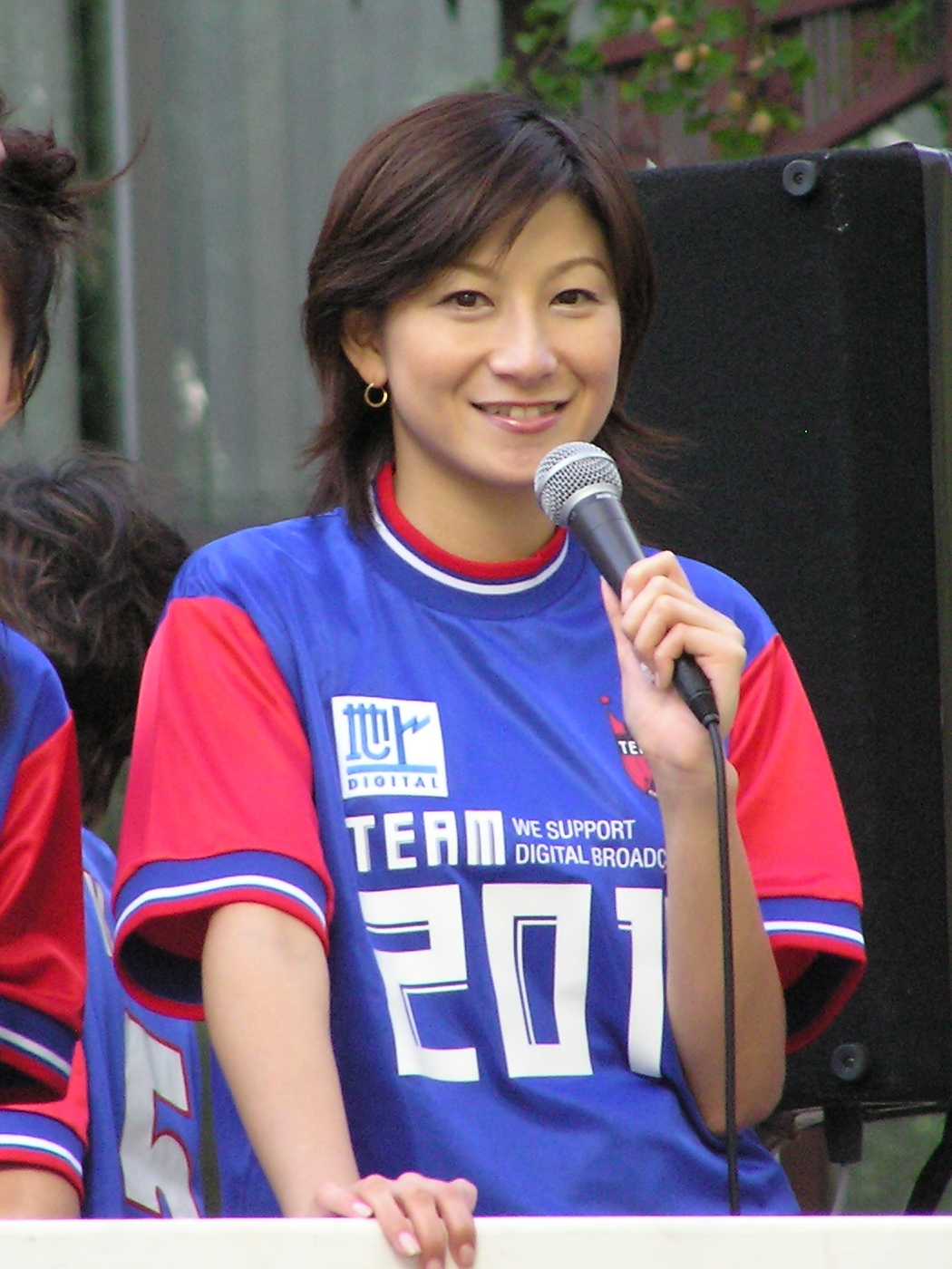 2006年10月8日、御堂筋パレードでPRする地上デジタル放送推進大使。